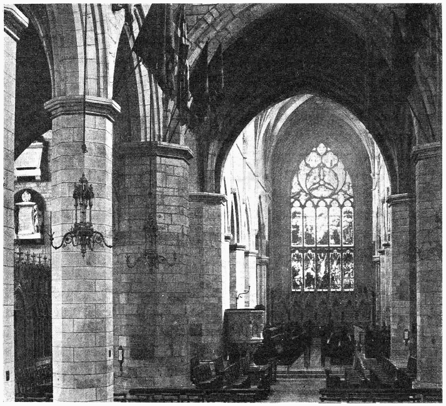 edimbourg, église saint-gilles